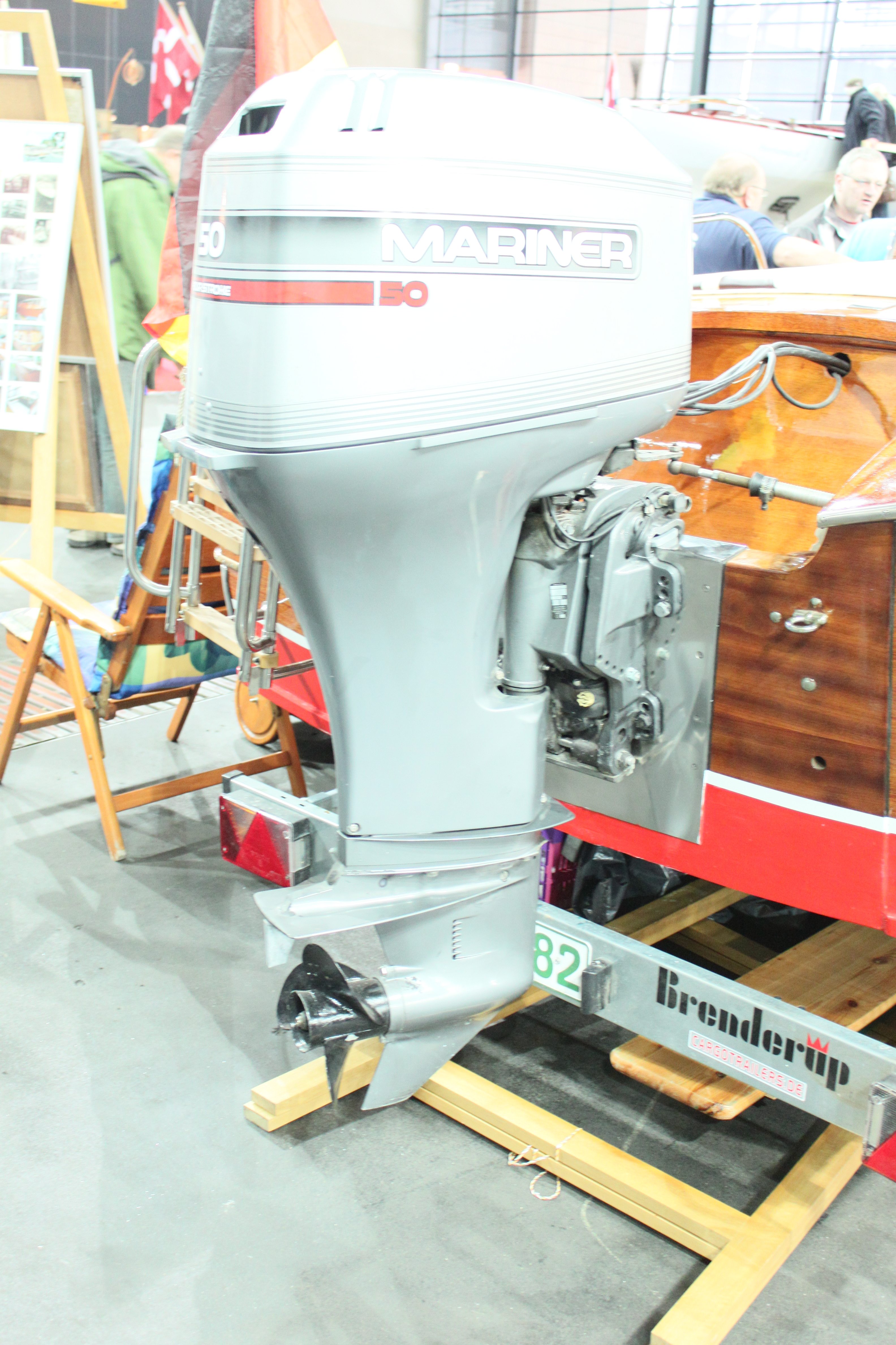 Außenbordmotor , gesehen auf der Messe Bremen "Boot 2011"